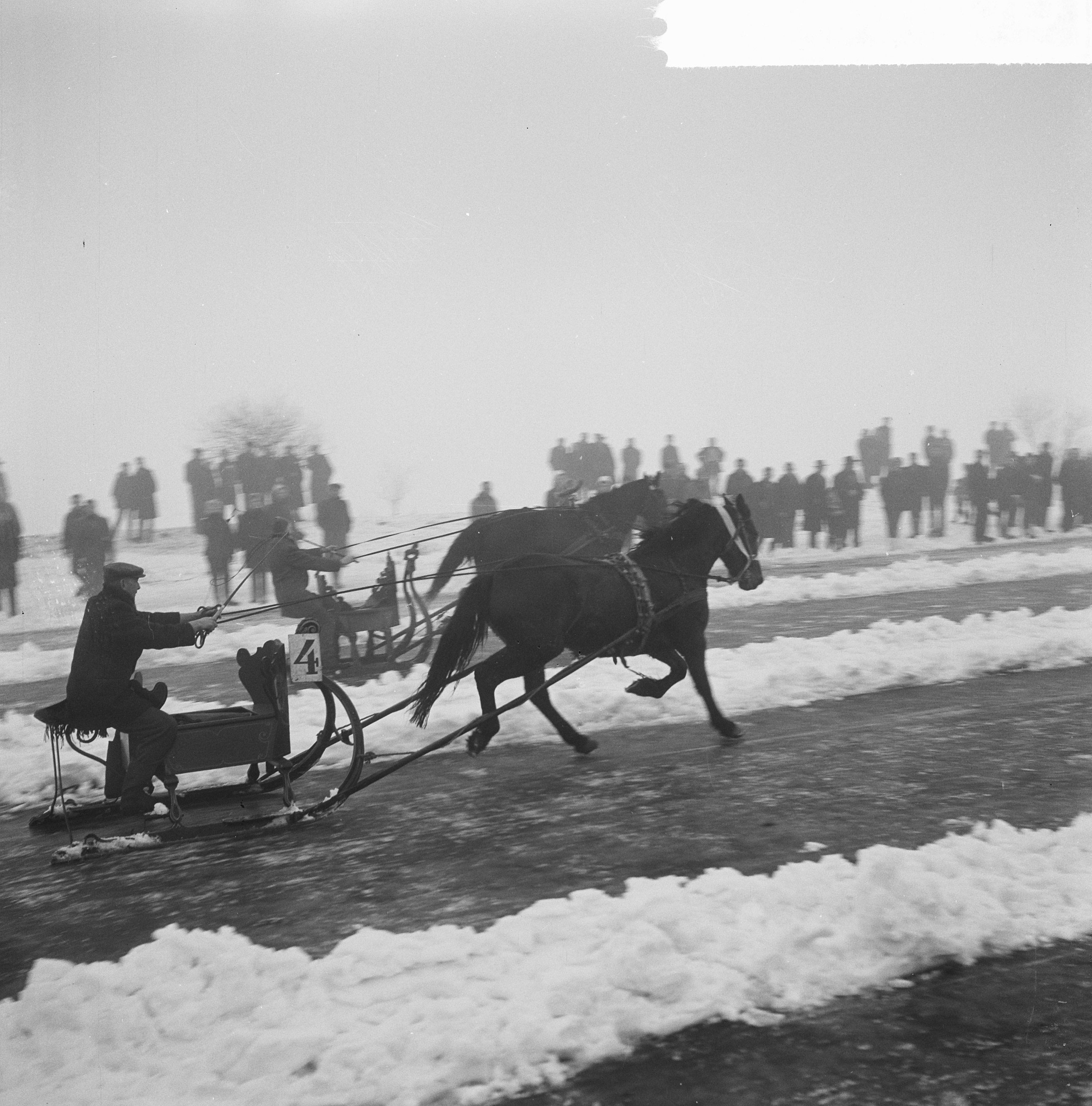 Collectie / Archief : Fotocollectie Anefo Reportage / Serie : [ onbekend ] Beschrijving : Oud en Nieuw in Akkrum, R. Jelsma uit Oldeboorn Datum : 5 januari 1963 Locatie : Akkrum Persoonsnaam : R. Jelsma Fotograaf : Nijs, Jac. de / Anefo Auteursrechthebbende : Nationaal Archief Materiaalsoort : Negatief (zwart/wit) Nummer archiefinventaris : bekijk toegang 2.24.01.03 Bestanddeelnummer : 914-6808